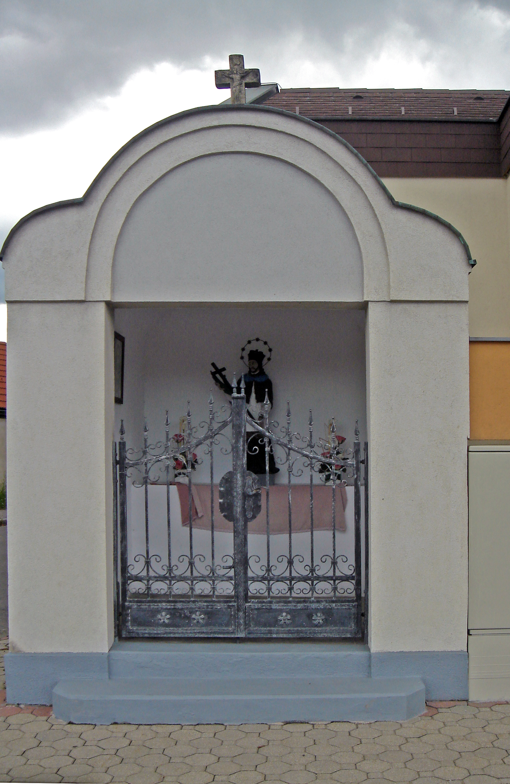 Lackendorf, Burgenland, bei Hauptstraße 20, Krainatzkapelle (Johannes-Nepomuk-Kapelle).